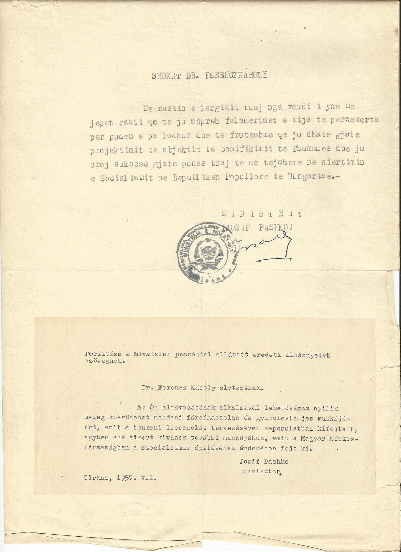 Dr Ferencz Károly munkásságát megköszönő hivatalos levél, Josif Pashko akkori Albán miniszterelnöktől, melyben kiemelkedően méltatja Ferencz doktor munkáját. 1957.10.10